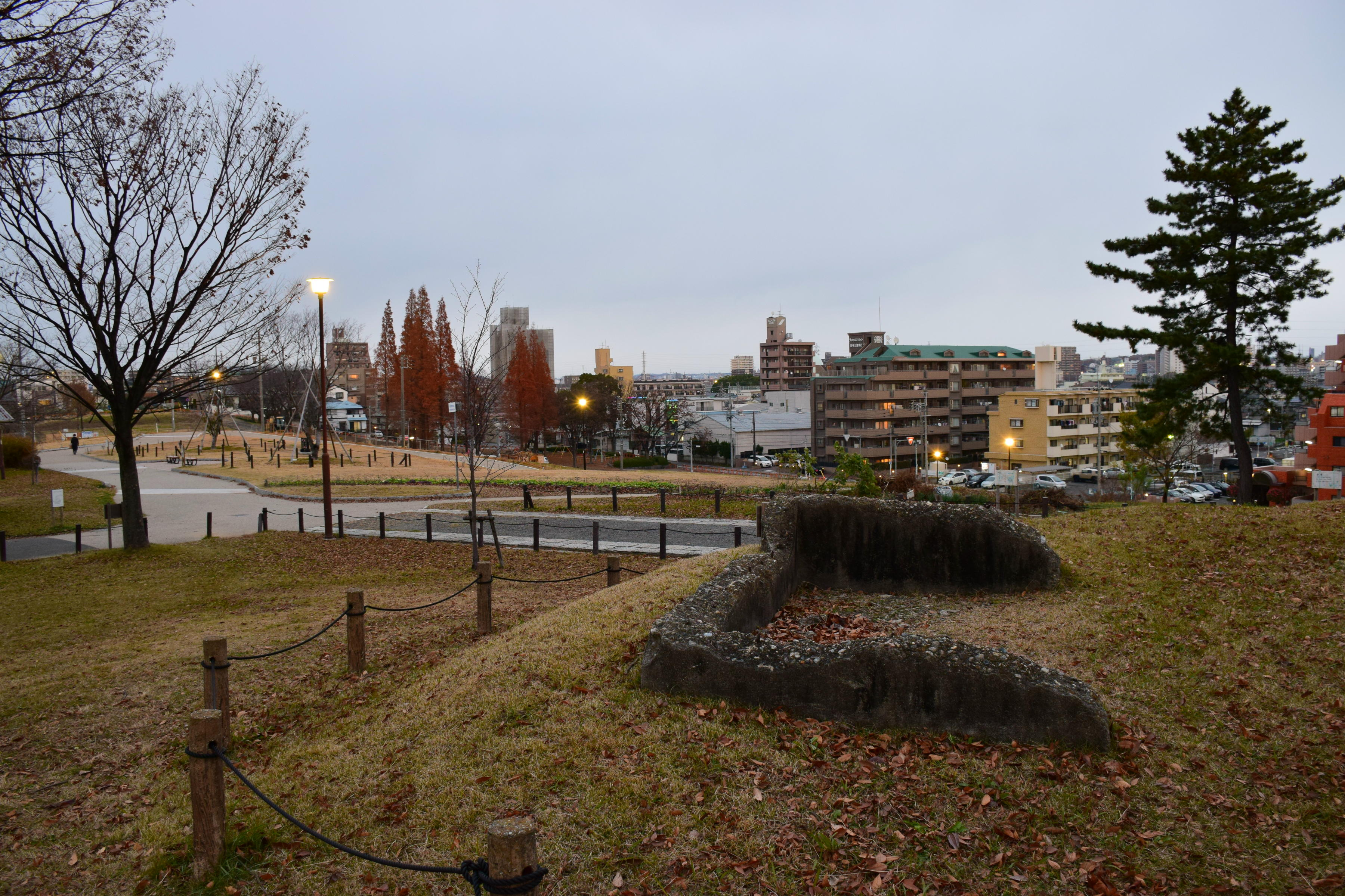 笠寺公園内